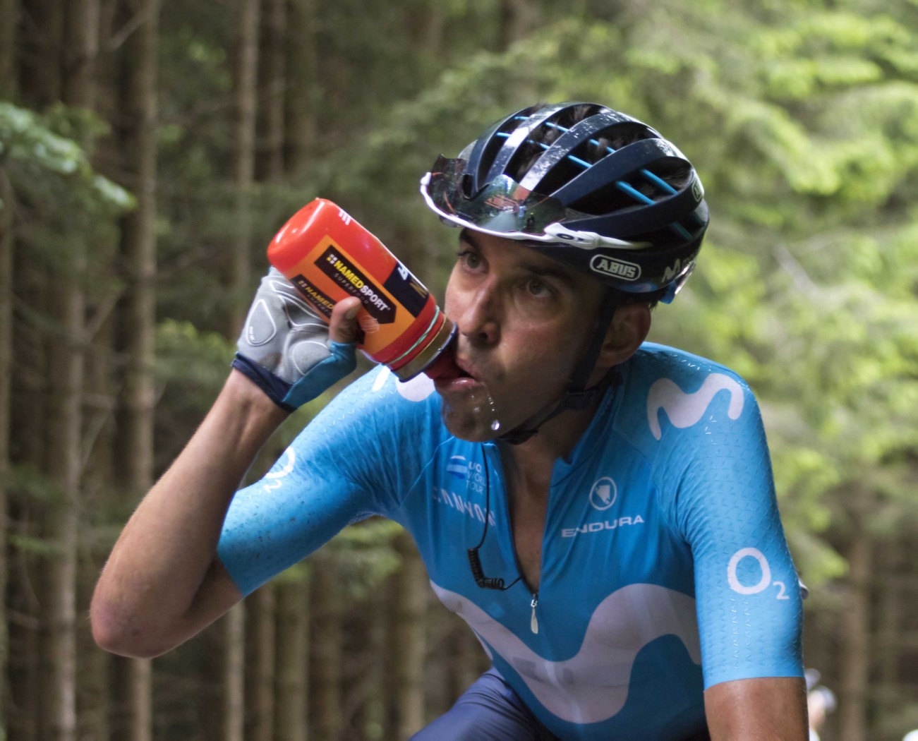 GIR10123 movistar